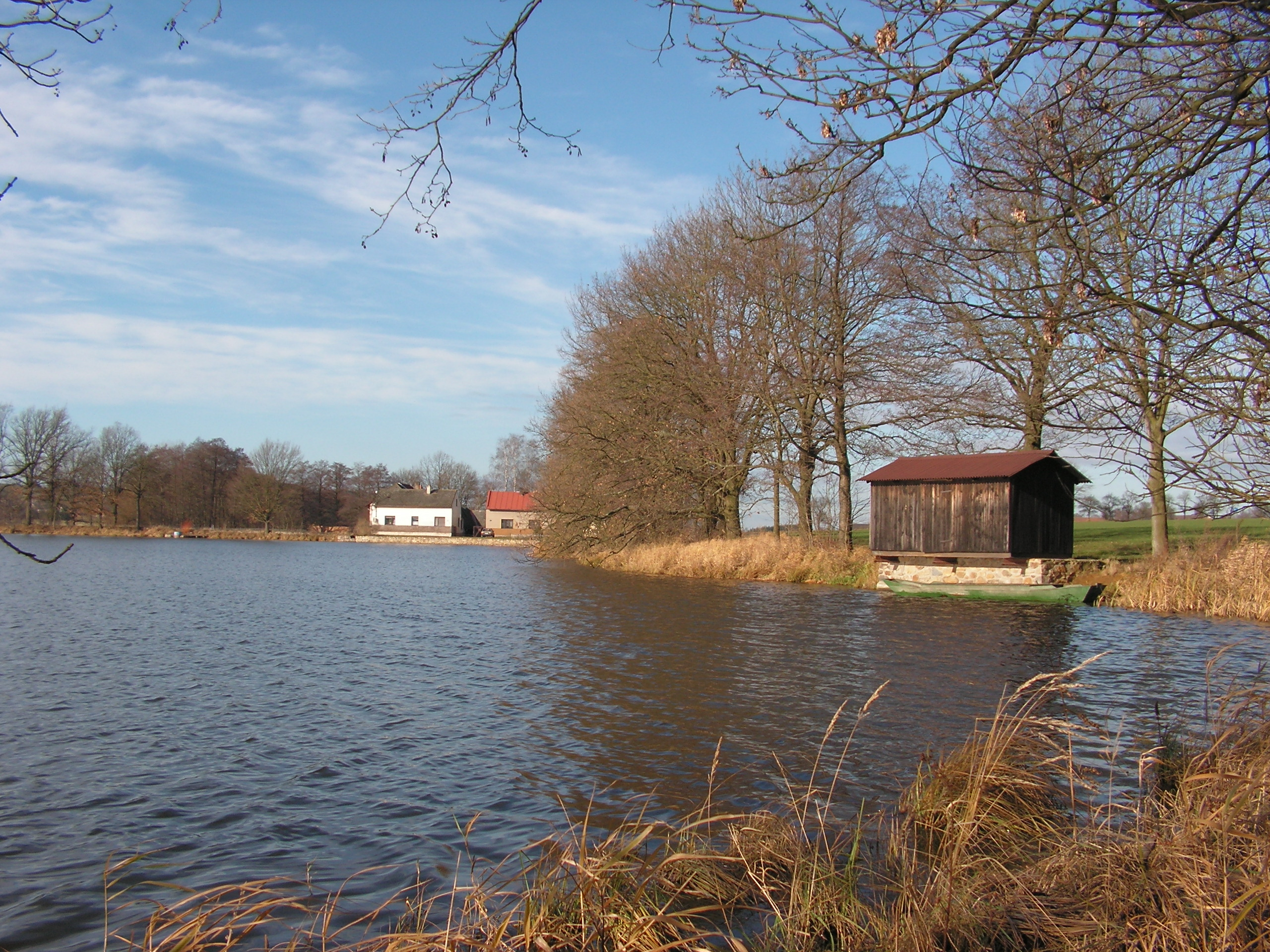 Jiříkovský rybník v okrese Havlíčkův Brod. Pohled k hrázi.